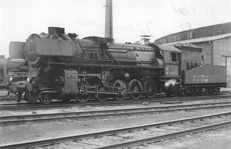 Dampflok 52 1952 (BR 52) Zentralbild Schmidtke 7.8.1952 Lokomotivtypen der Deutschen Reichsbahn. UBz: Rostlokomotive mit Turbine, Baureihe 52.